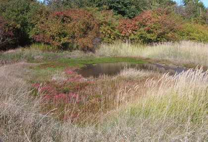 Fläche am Salzgraben Salzdahlum, Niedersachsen, Bundesrepublik Deutschland